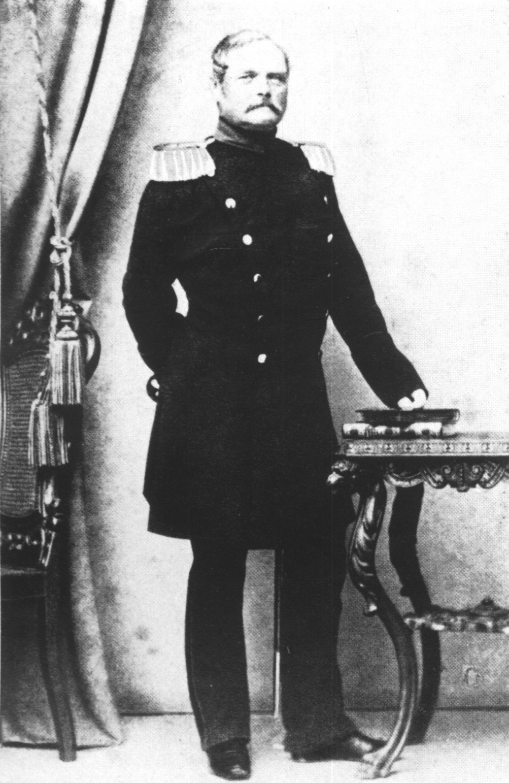 Leopold [August] von Stutterheim (19.09.1808-01.05.1868) Generalmajor